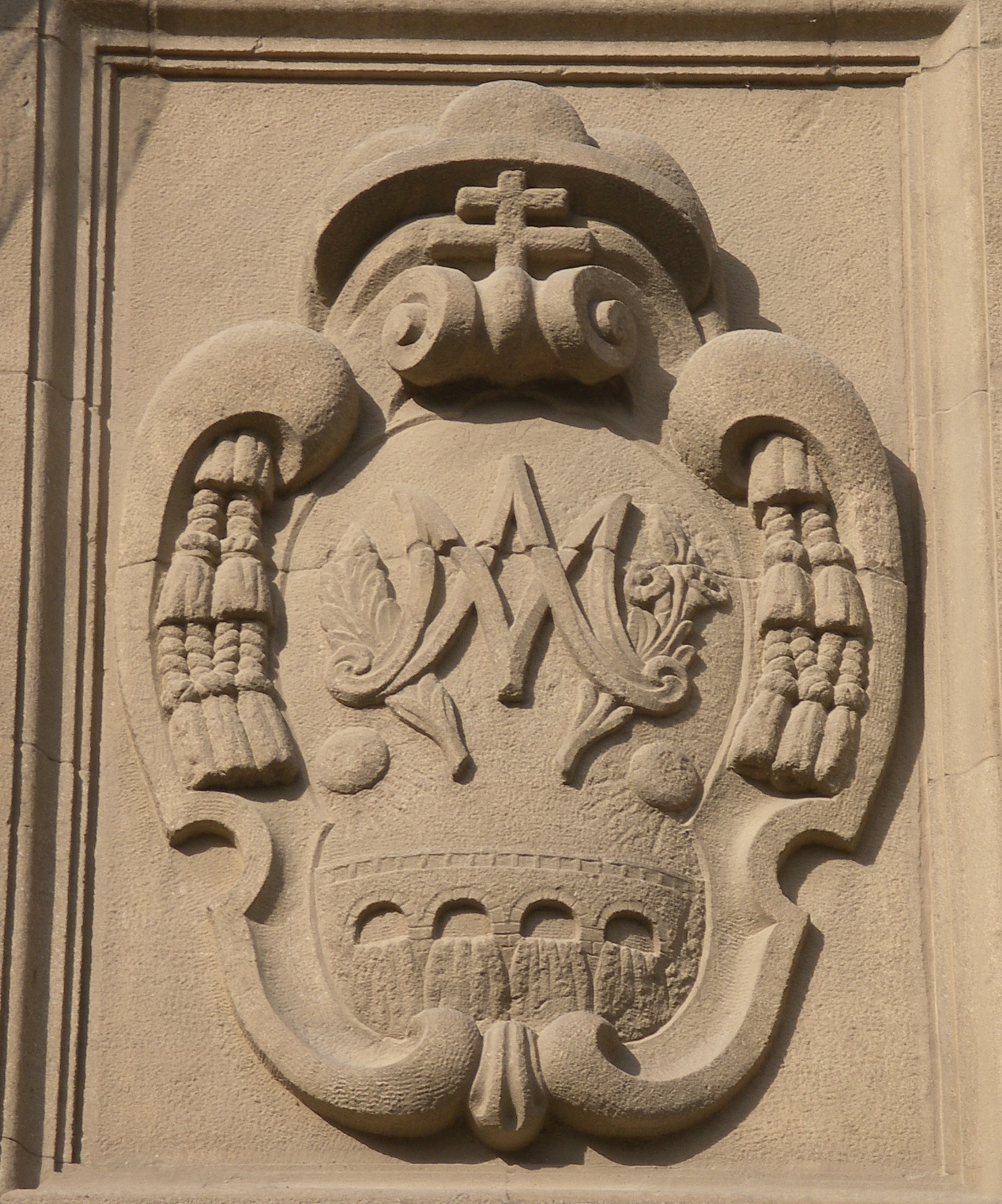 Escudo de las Religiosas Misioneras Claretianas en el Templo de Sant Antoni M. Claret en Vic